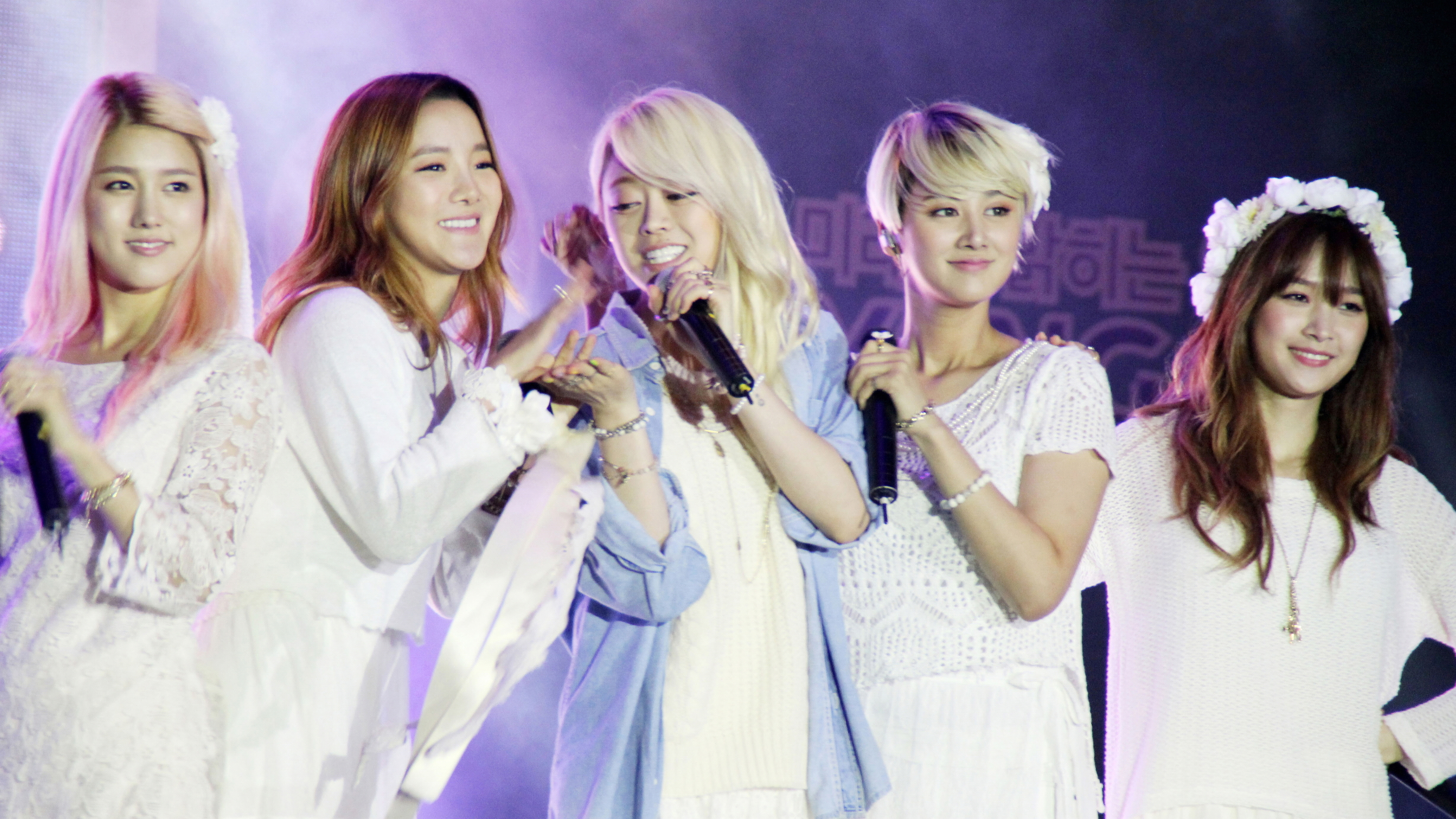 130929 양주목화페스티벌 기타 가수 직찍